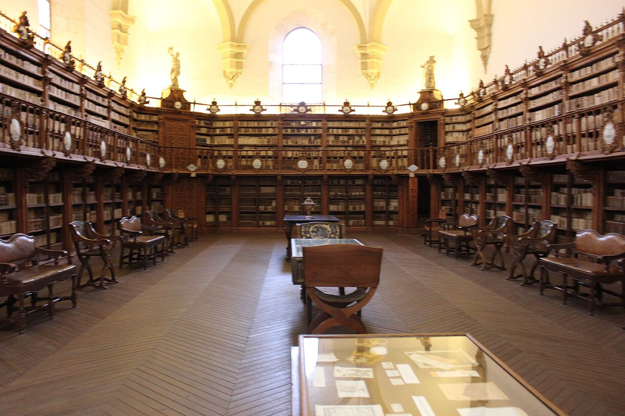 Es la Biblioteca General Histórica de la Universidad de Salamanca